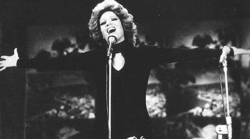 Iva Zanicchi al Festival di Sanremo 1974